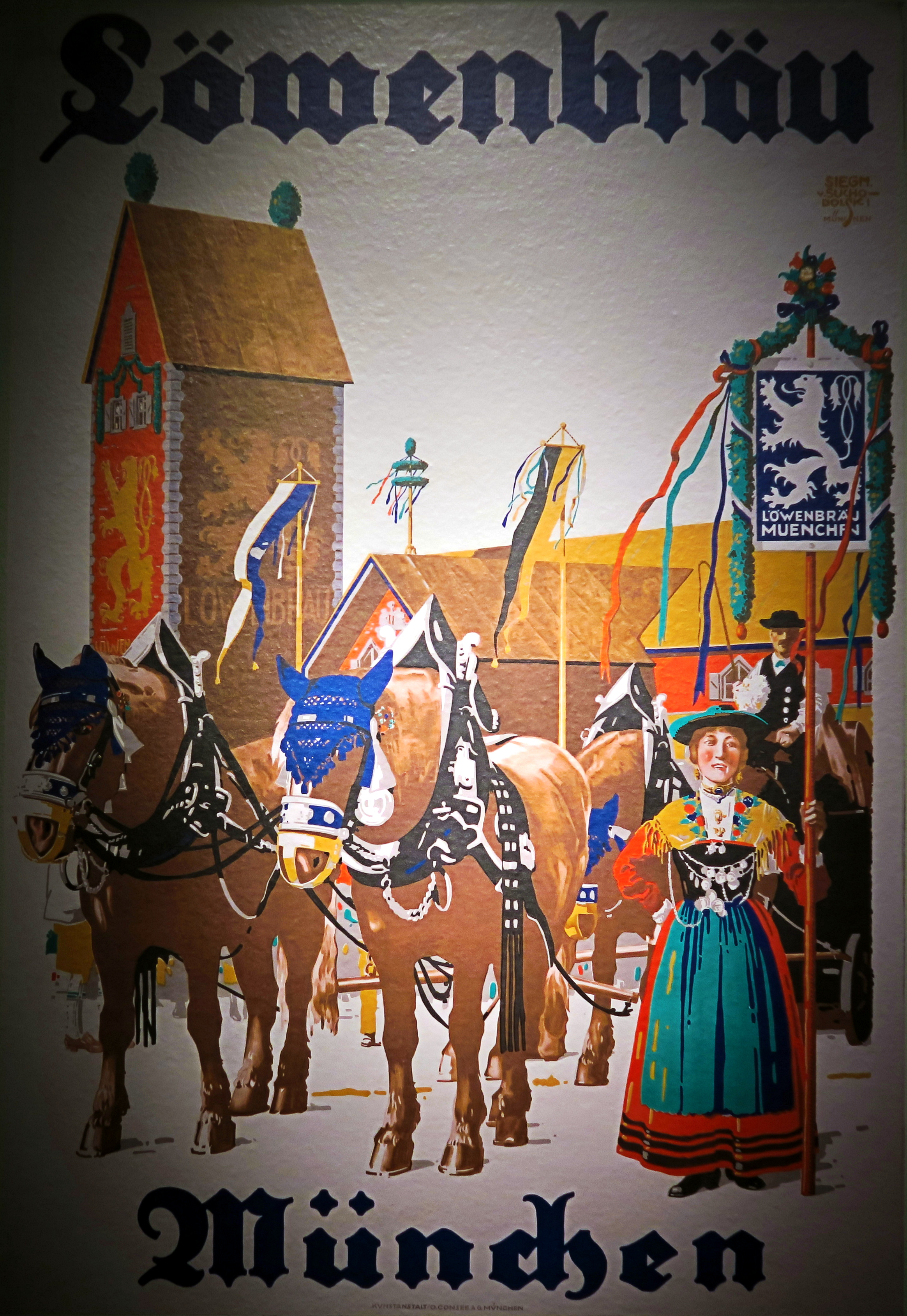 Farblitographie des Künstlers Siegmund von Suchodolski (1875-1925) mit dem Aufdruck: Löwenbräu München. Es zeigt eine Brauereikutsche vor dem Löwenbräu-Festzelt auf dem Münchner Oktoberfest um 1925